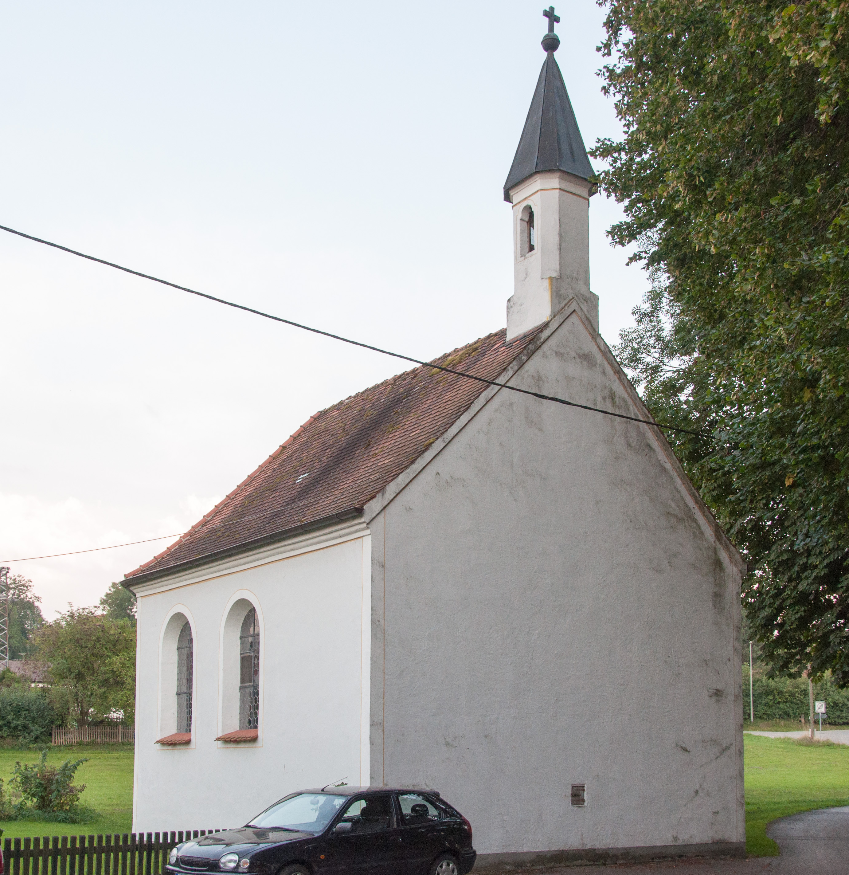 Kapelle, sog. Haldenkapelle, einschiffiger Satteldachbau mit kleinem Turm, 1816 Neubau nach Vorbild der alten Haldenkapelle (1739/40) an anderem Standort.This is a photograph of an architectural monument.